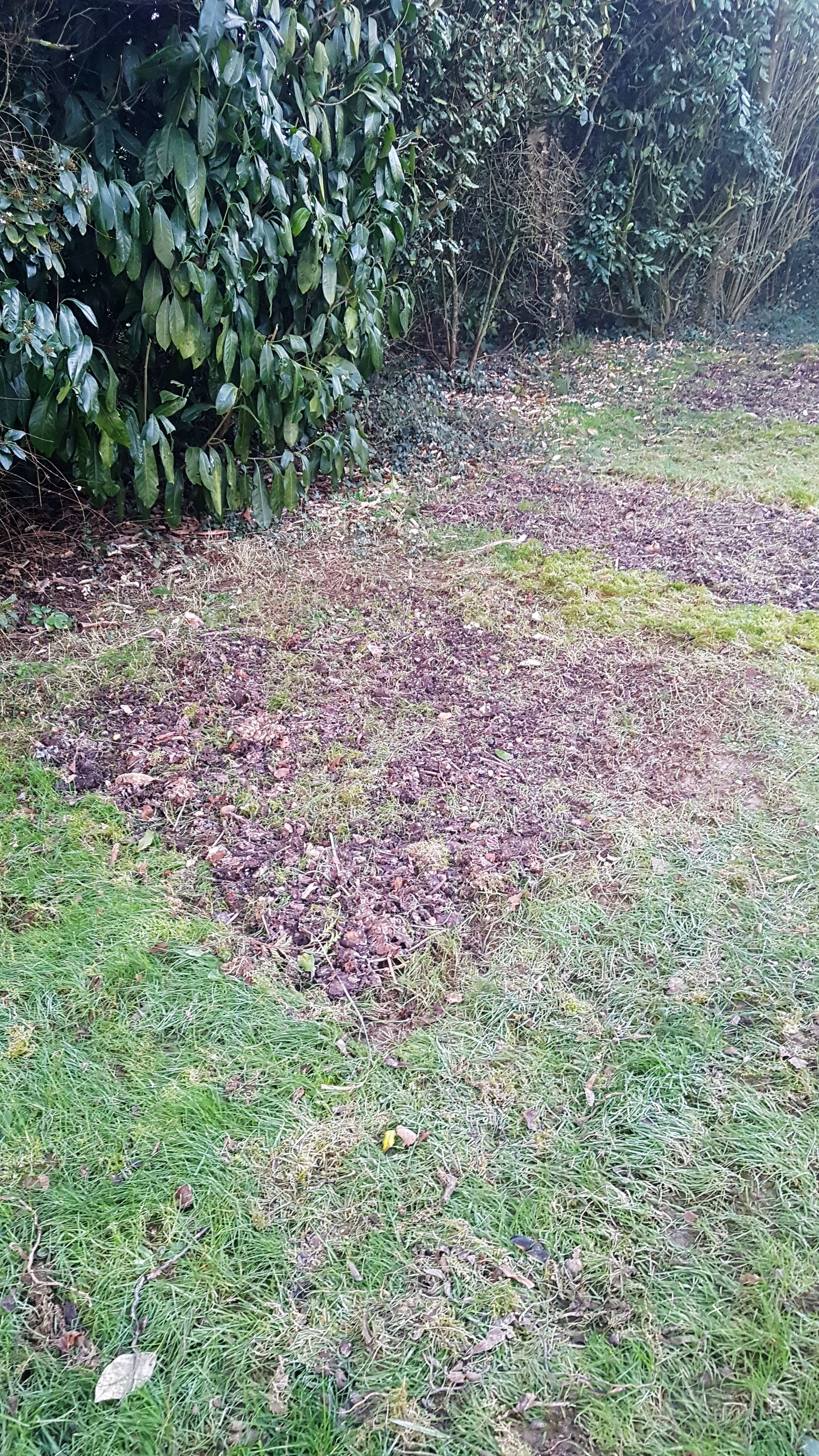 Terreautage à base de compost immature